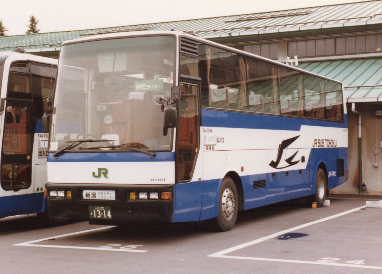 小国営業所担当時代 641-0954 山形22あ１３１４ 仙台支店にて